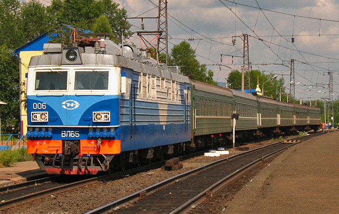 Электровоз ВЛ65-006 Россия, Иркутская область, станция Гидростроитель Длительная стоянка поезда 87/88 Усть-Илимск - Иркутск